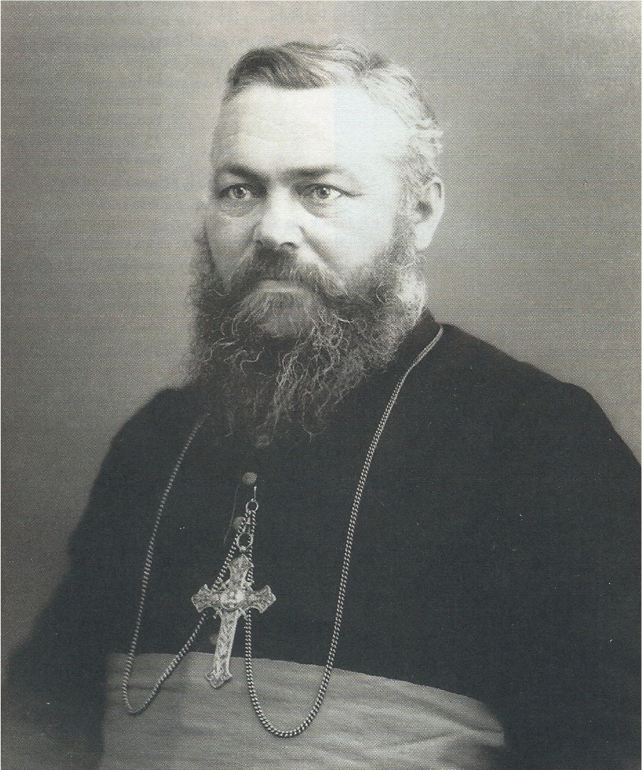 Portret van mgr. Frans Schraven